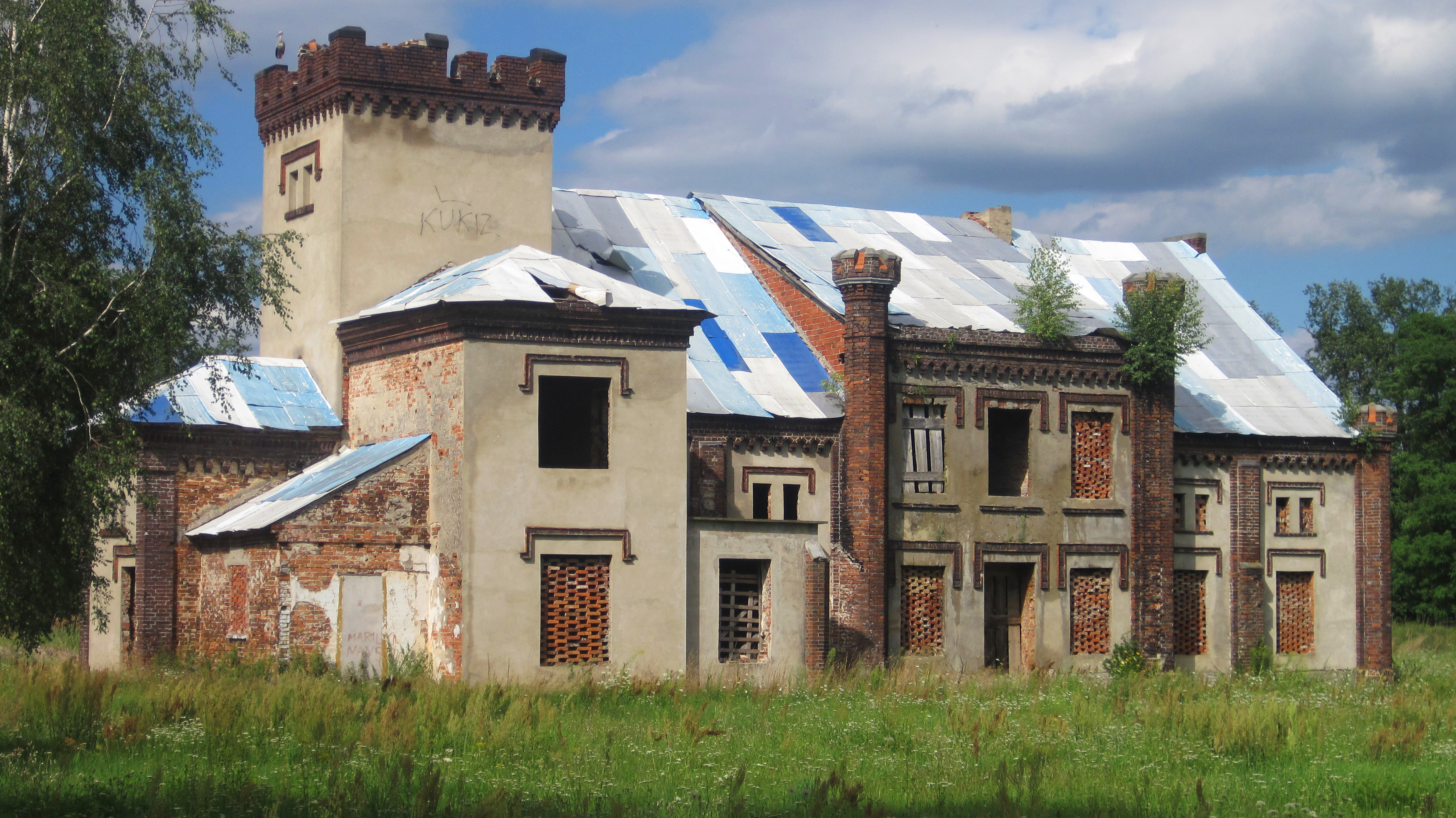 Dwór w Boguszynie k. Jarocina.